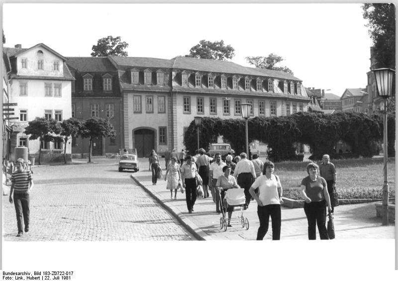 Weimar, Frauenplan, Goethe-Haus, Goethe-Museum ADN-ZB Link 22.7.1981. Weimar: Das weltbekannte Goethe-Nationalmuseum am Frauenplan, das jährlich von Hunderttausenden besichtigt wird, erwartet 1982 einen besonders starken Besucherstrom. Den Hauptanziehungspunkt bildet Goethes Wohnhaus (rechts), ein repräsentatives Bürgerhaus aus dem 18. Jhs., in dem er fast fünf Jahrzehnte seines Lebens verbrachte und das so erhalten ist, wie es sich bei Goethes Tod befand. Links schließt sich ein umfassendes Museum zu Goethes Leben und Werk an, das bedeutendste Literaturmuseum der DDR, das gegenwärtig eine umfassende museologische Neugestaltung und innenarchitektonische Rekonstruktion erfährt und im März 1982, zum 150. Todestag Goethes, wiedereröffnet wird.